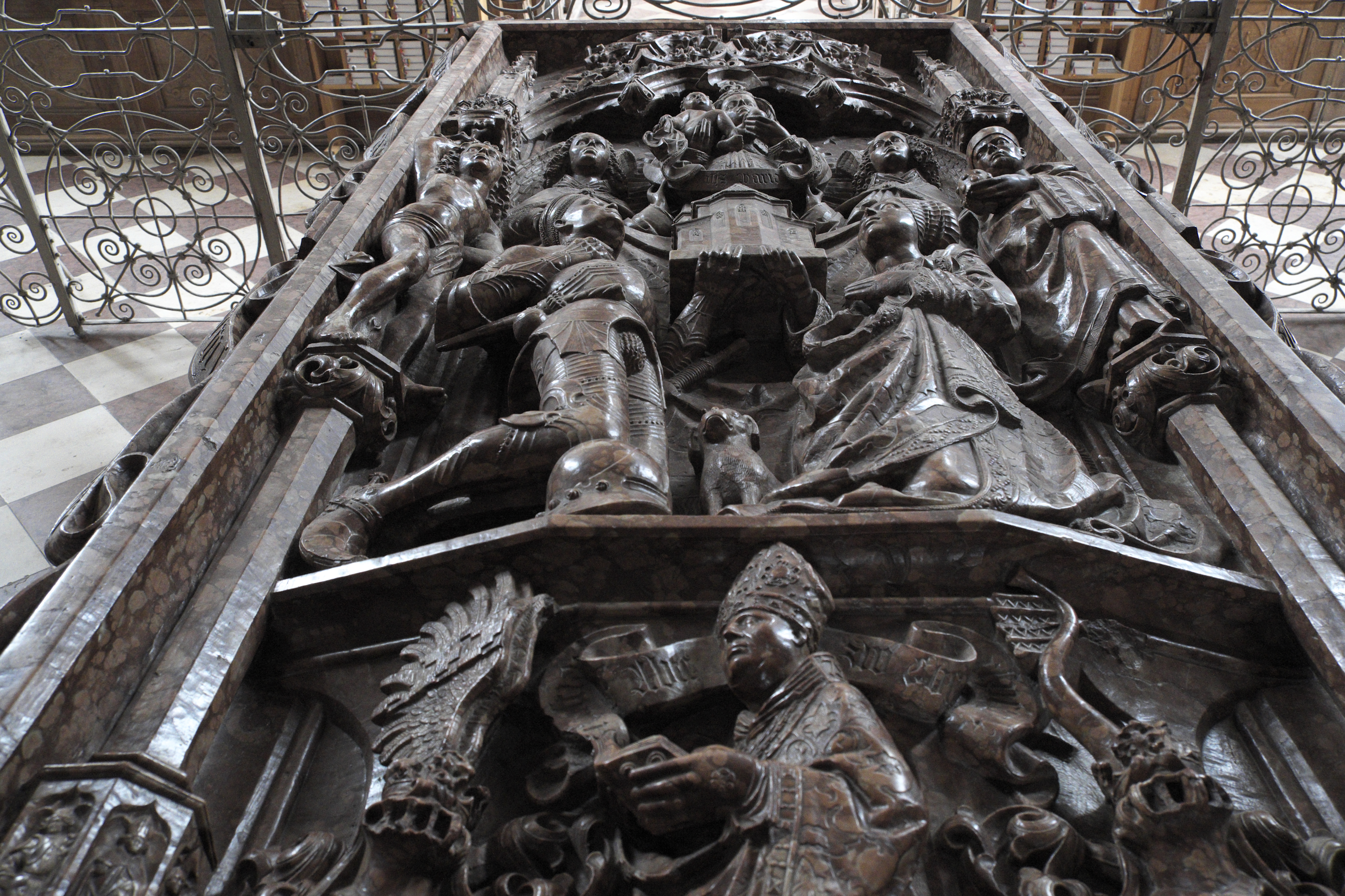 Katholische Pfarr- und Wallfahrtskirche St. Sebastian in Ebersberg (Bayern/Deutschland), Stifterhochgrab für Graf Ulrich von Ebersberg und seine Gemahlin Richardis von Kärnten, von Abt Sebastian Häfele (1472–1500) in Auftrag gegeben, von Wolfgang Leb geschaffen und nach 1500 aufgestellt